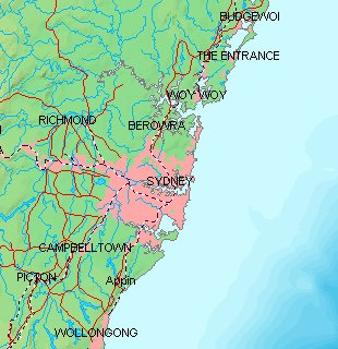 Übersichtskarte zur Lage der Stadt Sydney